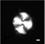 Discolito del Tithoniano Superior encontrado en una sección superficial al Norte de Puebla por Biol. Aldo Avila B.Barra de referencia 1 micra. (Avila,2005).